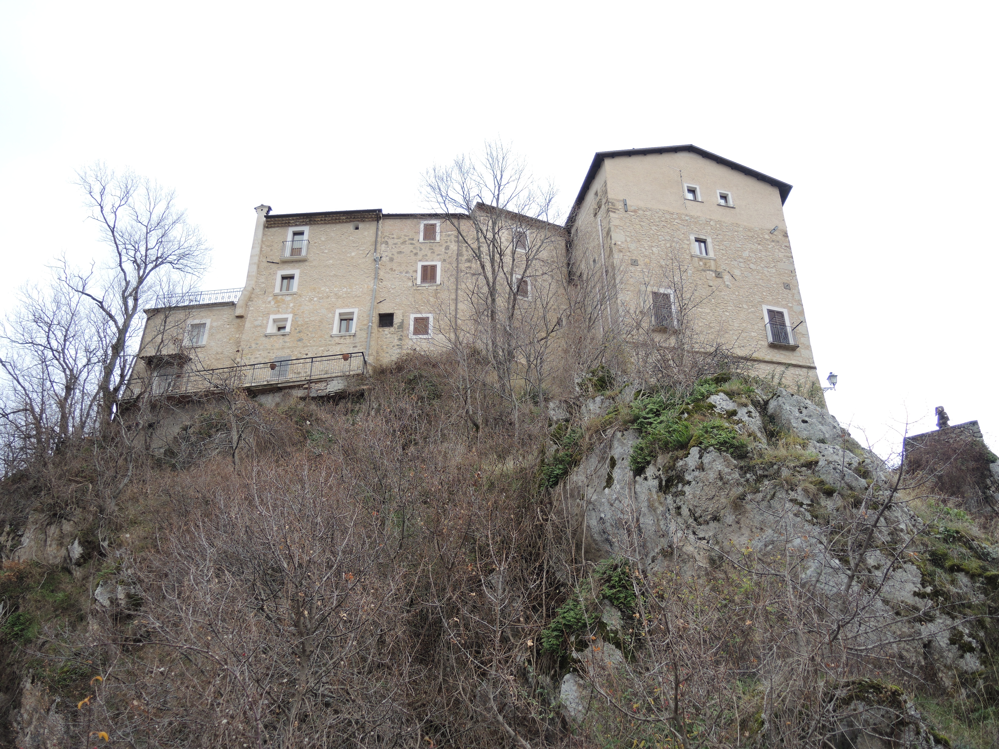 Castrovalva